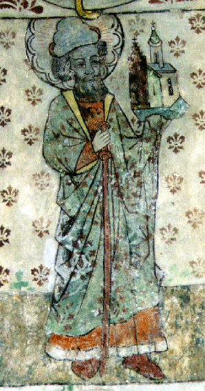 Manlig Gertrud i Sånga kyrka